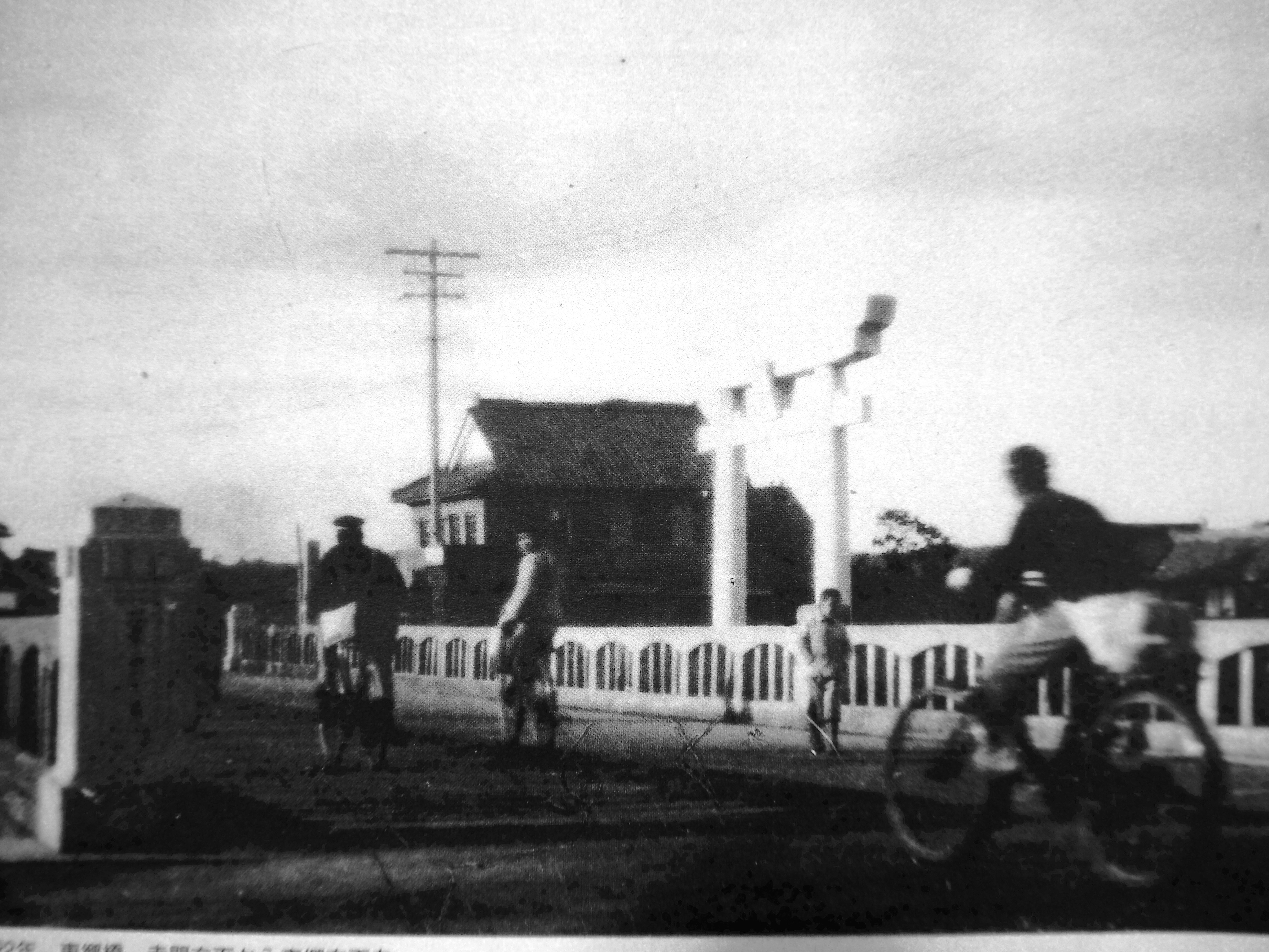 1946年頃に宗像市の東郷橋で撮影された写真。